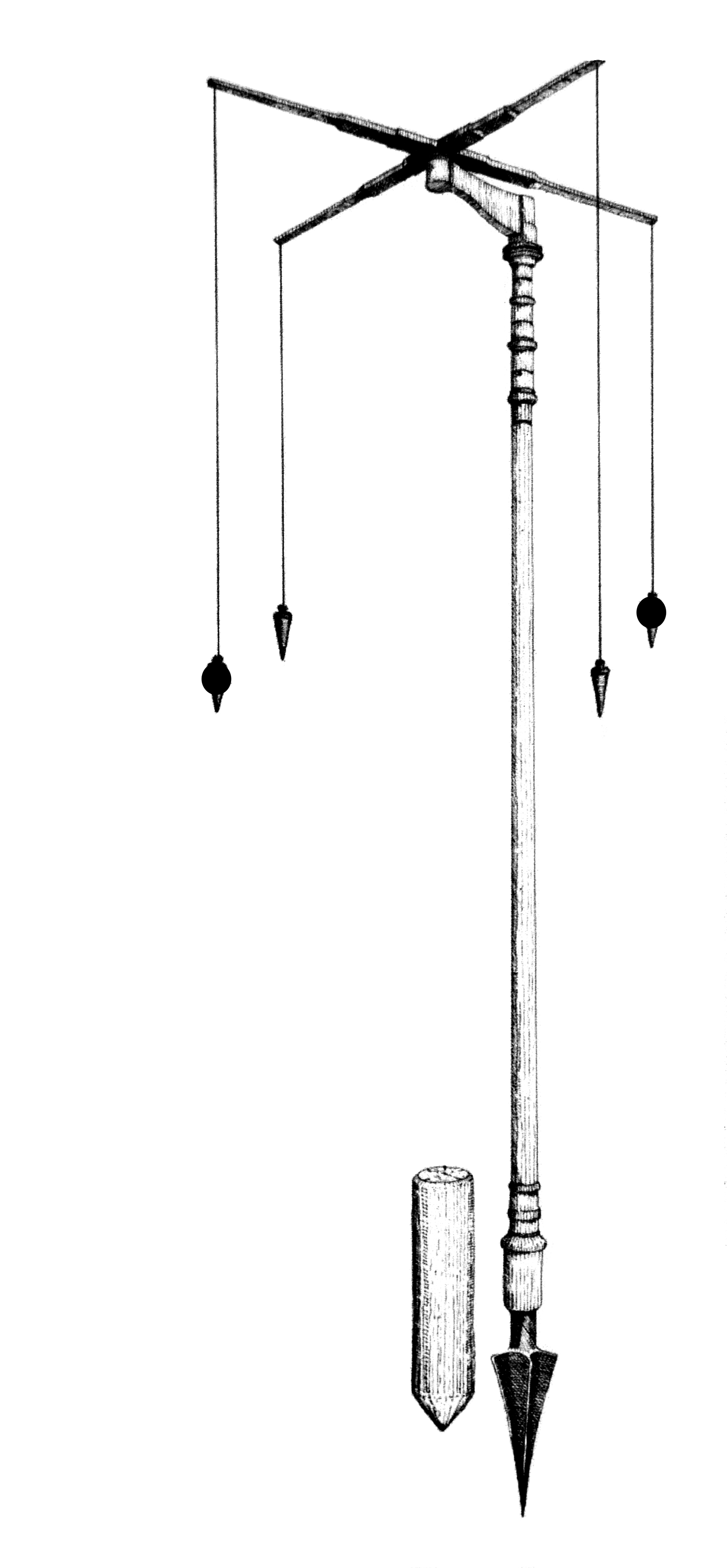 groma